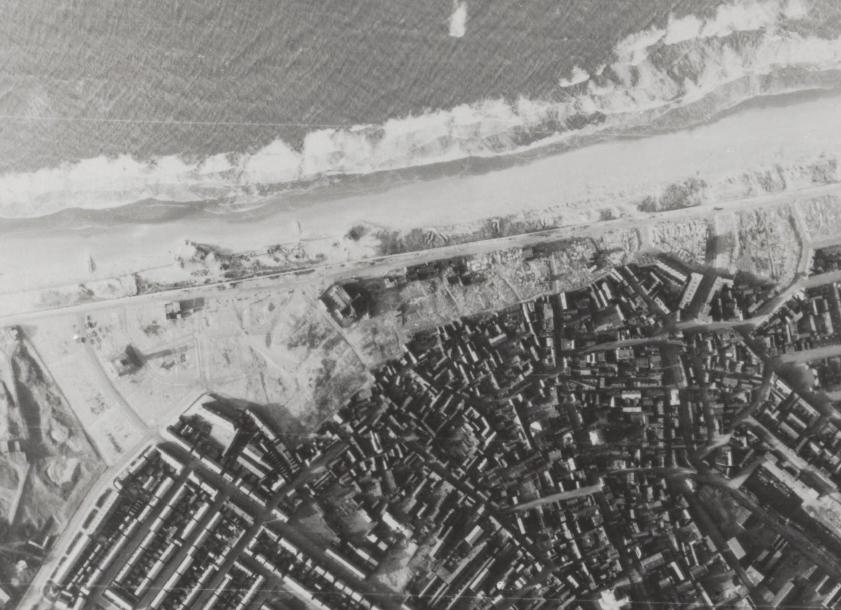 Luchtopname. Katwijk afgebroken. In 1942 maken de Duitsers van het strand een "Sperrgebiet", in de duinen en langs de boulevard verrijzen zware bunkers en muren. Ze ontruimen de kuststrook en slopen 600 woningen. Velen moeten evacueren, zelfs naar Groningen. Langs de boulevard blijft bijna alleen de Oude Kerk staan, van zijn toren beroofd.